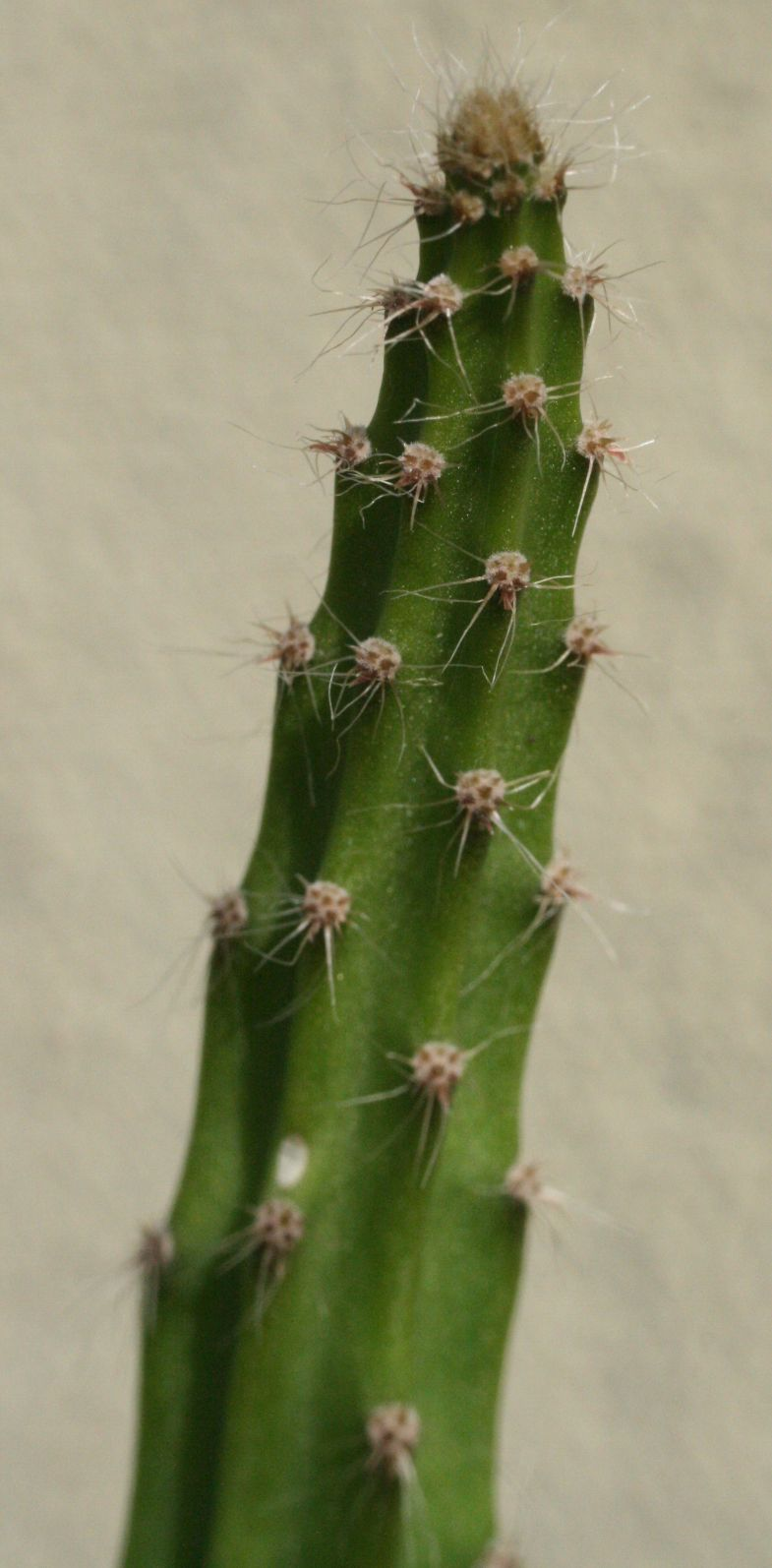 Selenicereus donkelaarii, syn. Selenicereus grandiflorus subsp. donkelaarii